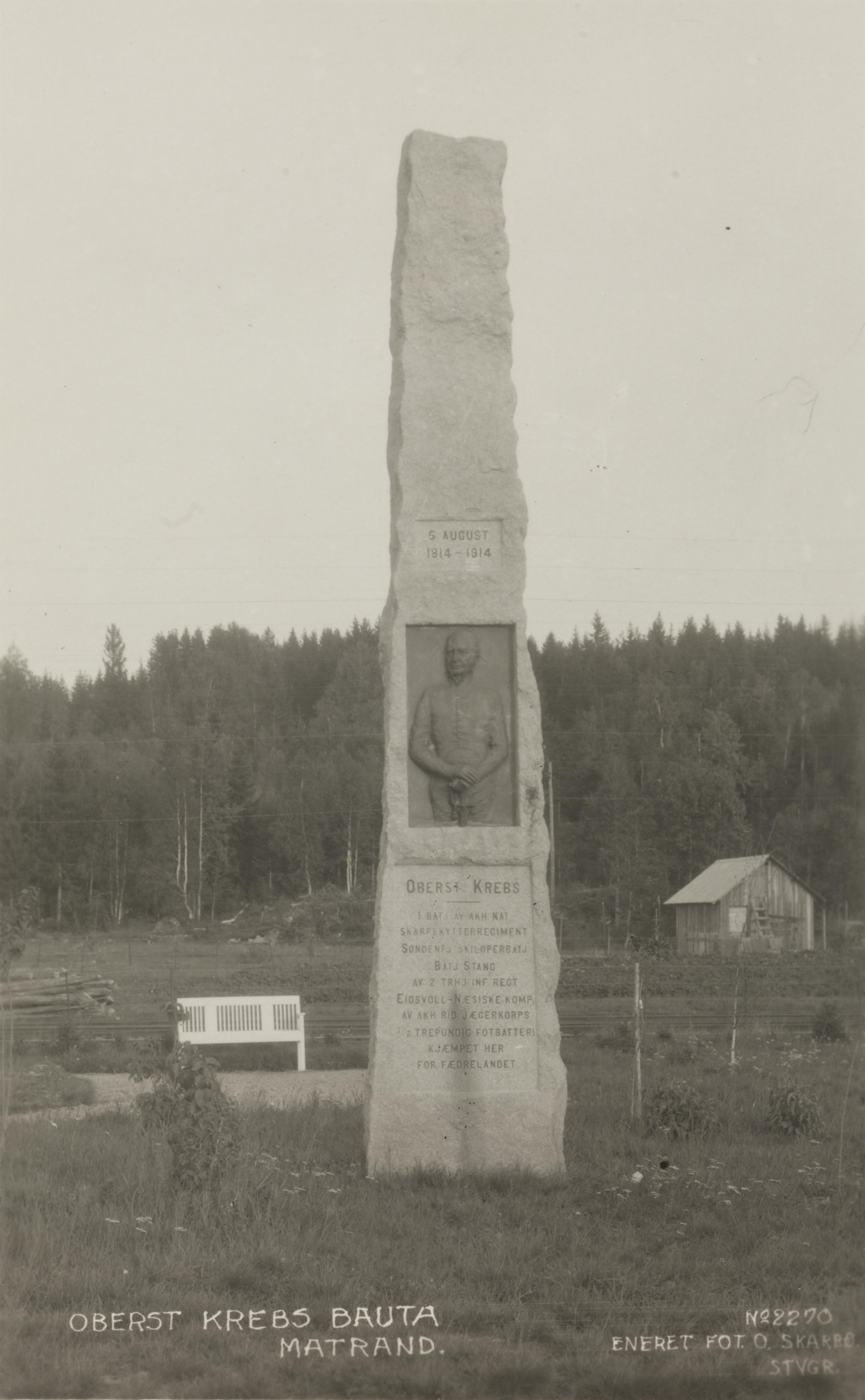 Bildet er hentet fra Nasjonalbibliotekets bildesamling Matrand, Eidskog, Hedmark